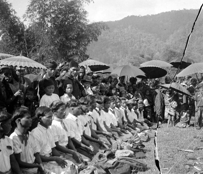 Negatief. Het zogenaamde Main Thaman te Lokep